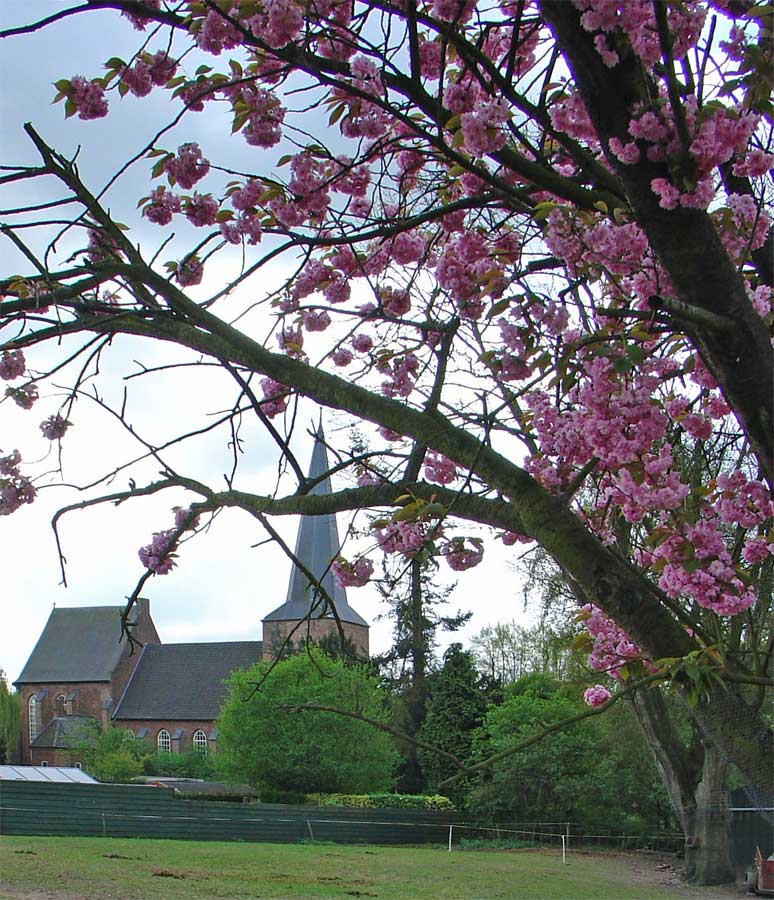 Hervormde kerk van Groesbeek Gelderland